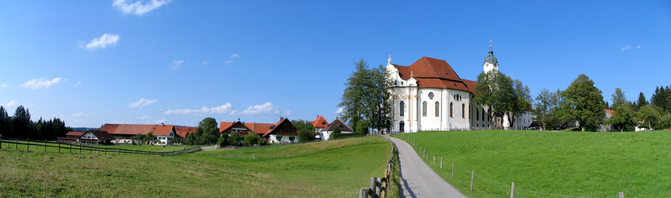 Wieskirche